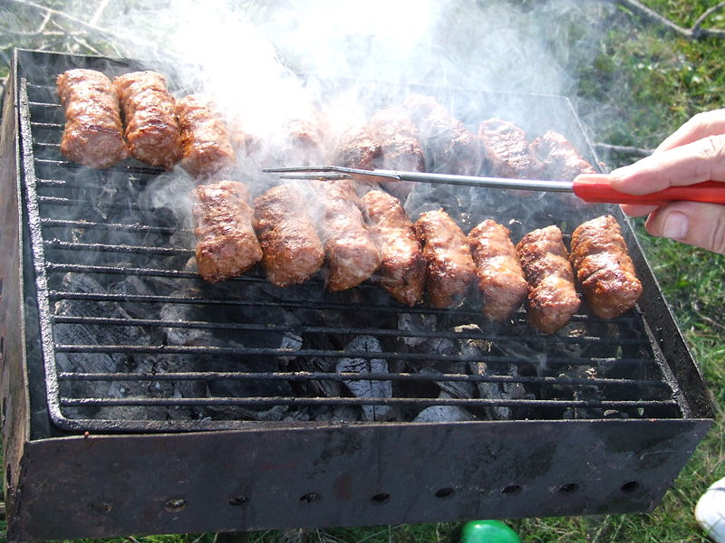 Familie la gratar in Romania. Aici in lunca Sucevei pe data de 24 septembrie 2007.